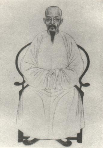 惠栋，清代学者。HUI Dong